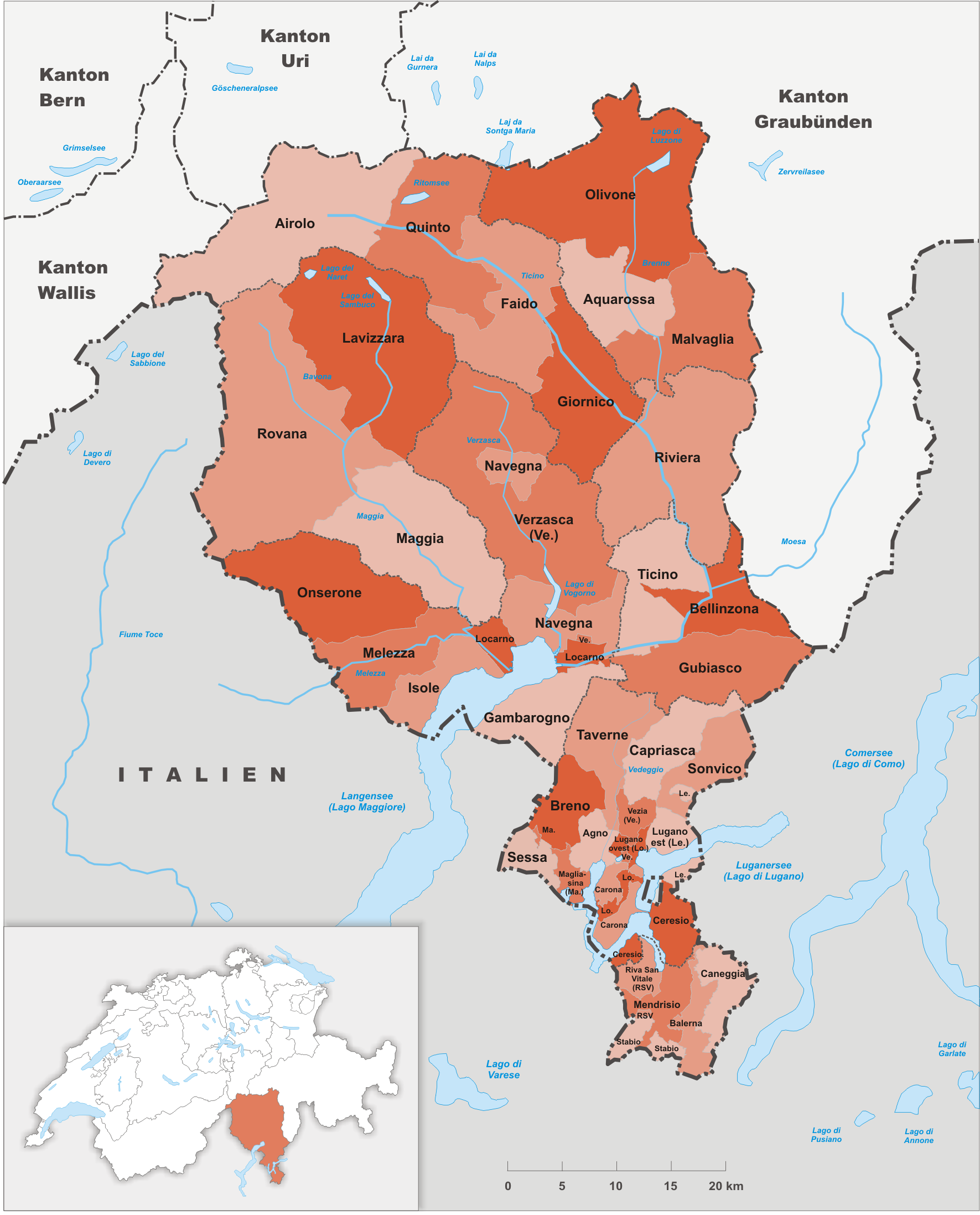 Kreise des Kanton Tessin